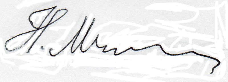 Firma de Nikolai Mitskievich 2012